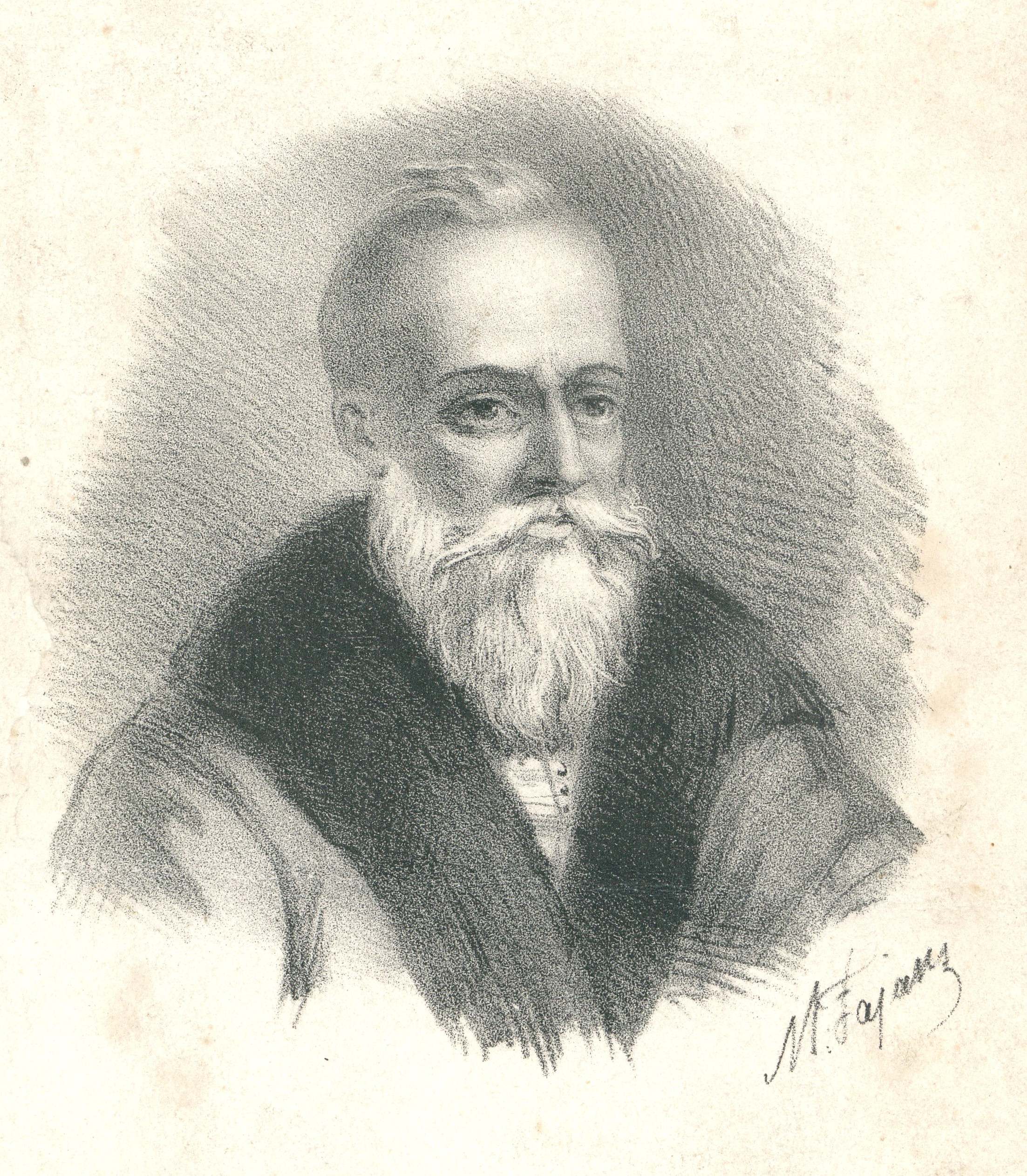 Adam Śmigielski